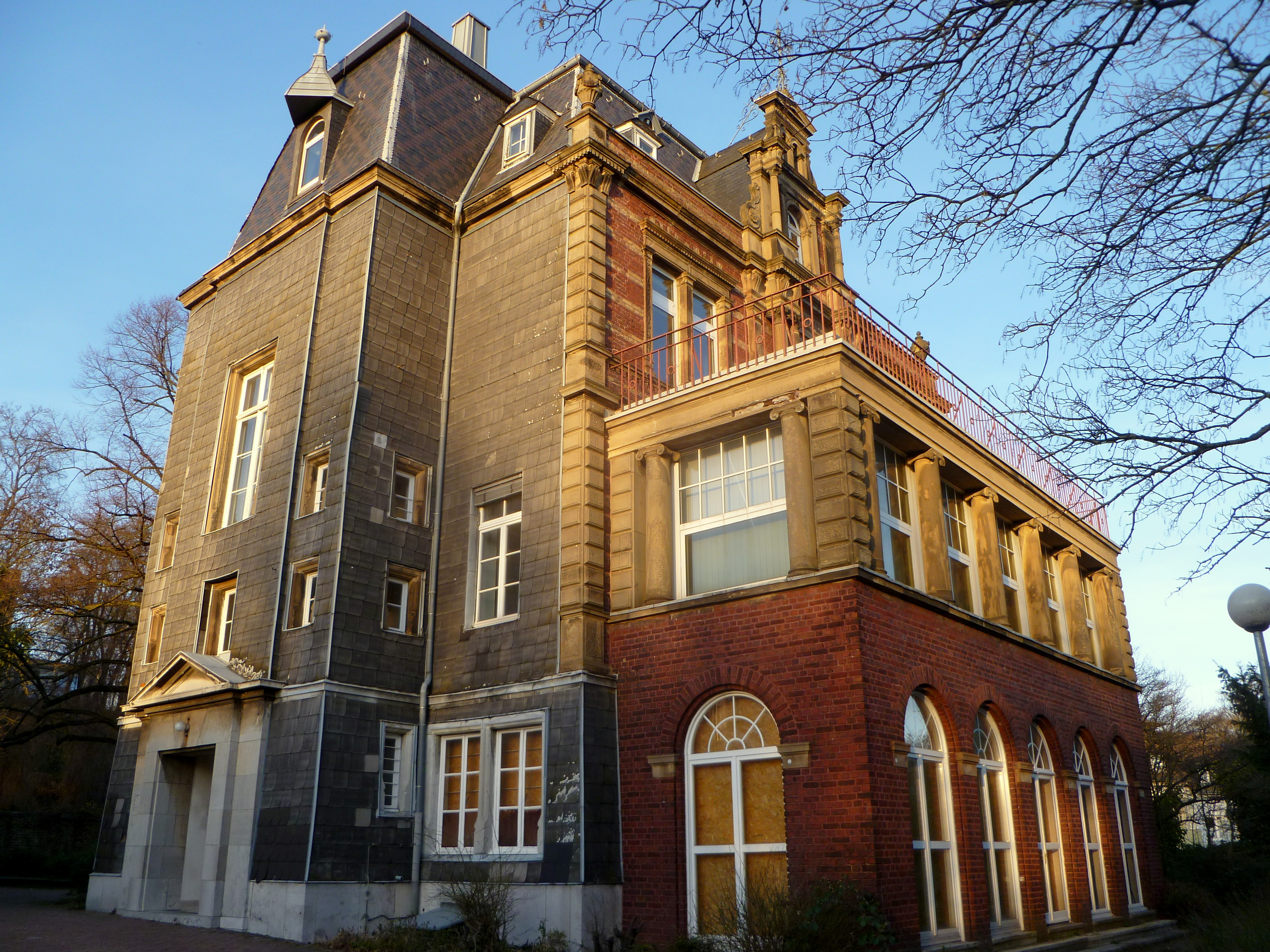 Villa Monheim in Aachen, Seit- und Rückansicht, Baudenkmal in Aachen. Ursprünglich 1874 als „Haus Marienhöhe“ erbaut durch den Architekt Hermann Joseph Hürth für den Fabrikanten Leonard Monheim